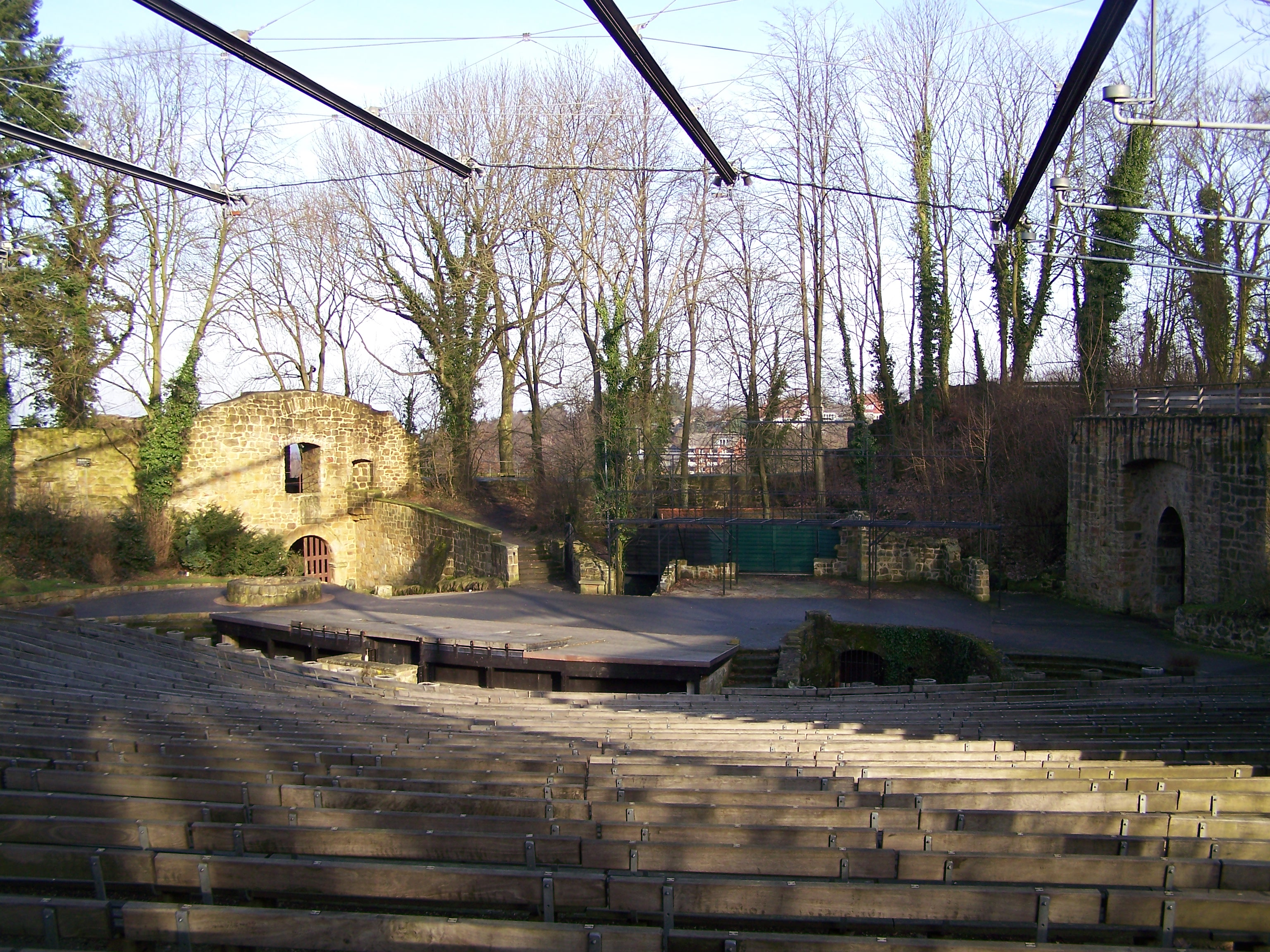 Freilichtbühne Tecklenburg, Teil der ehemaligen Tecklenburg